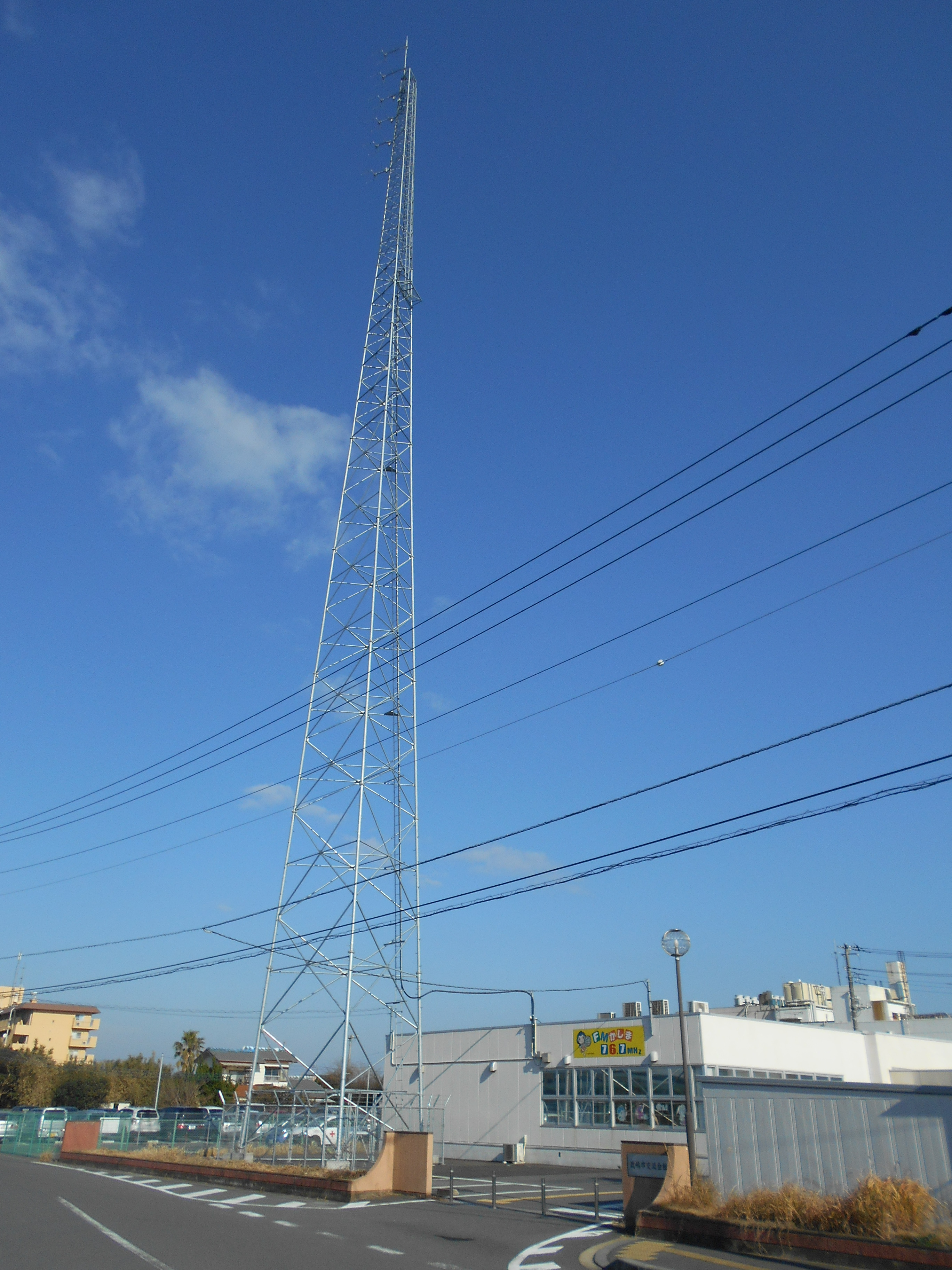 エフエムかしま市民放送株式会社の演奏所が入る鹿嶋市交流会館と送信所